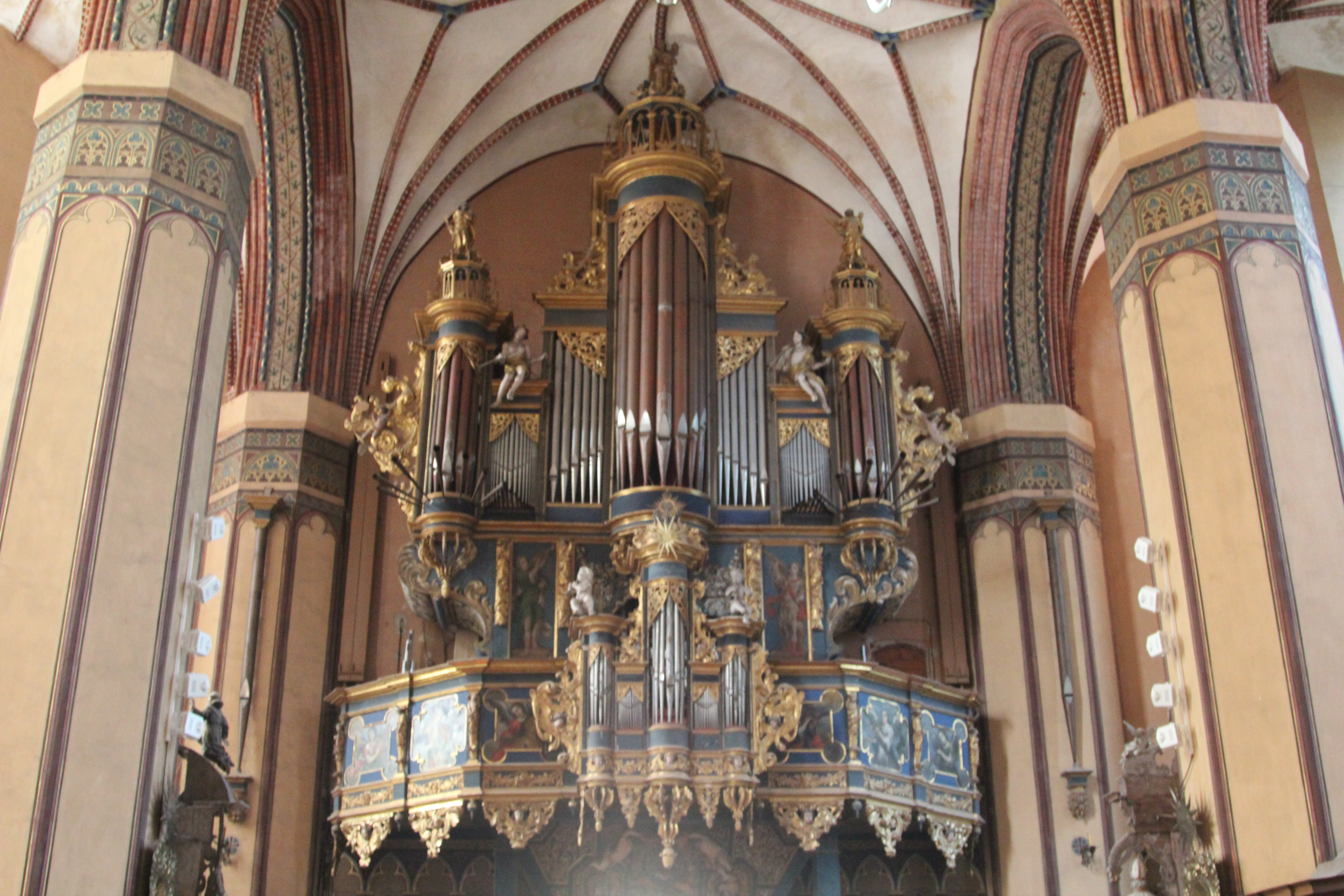 Frombork, katedra pw. Wniebowzięcia NMP i św. Andrzeja, 1329-1388, 1 poł. XVIII